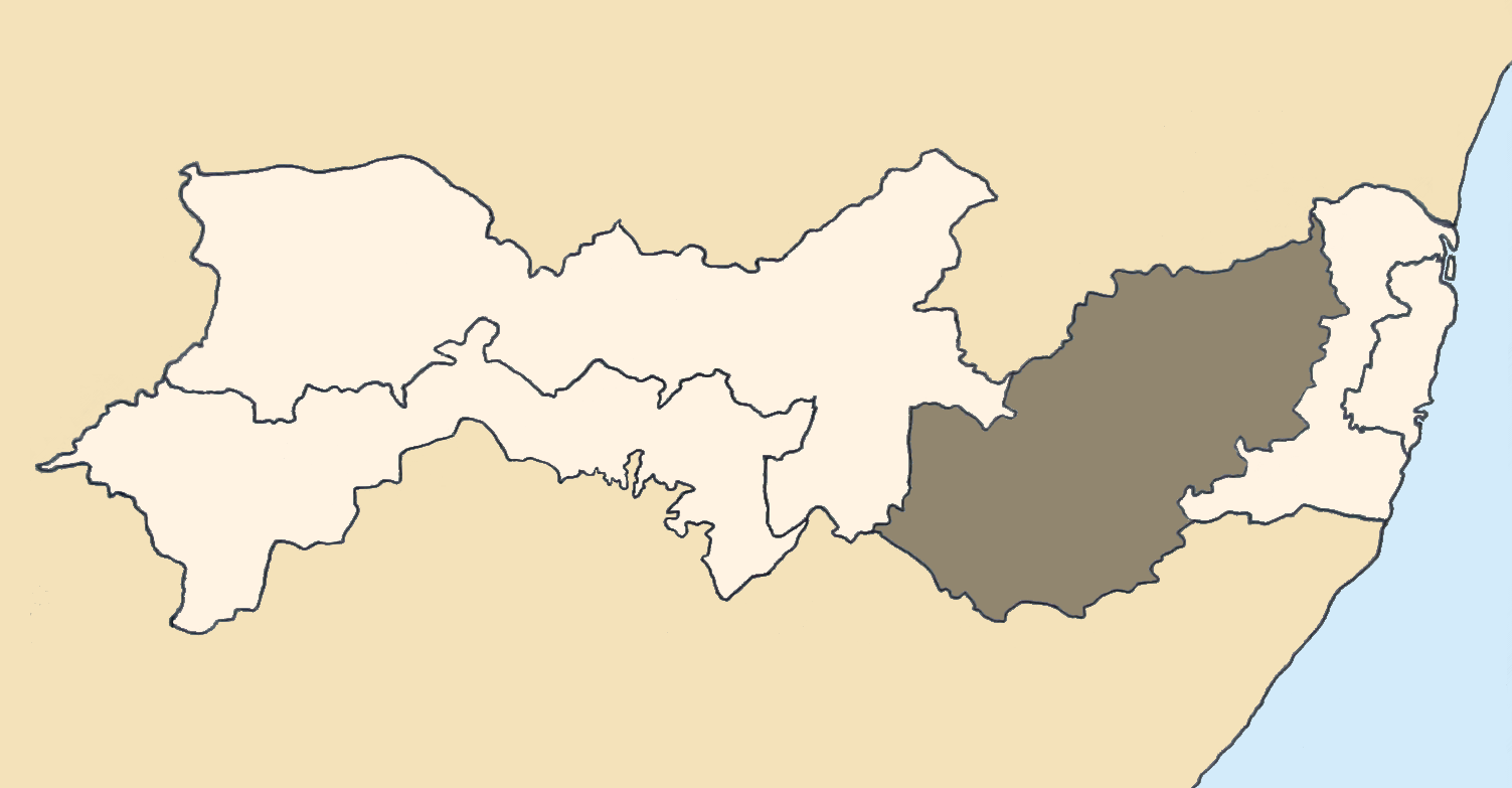 Mapa da mesorregião Agreste de Pernambuco (Brasil). Map of the brazilian state of Pernambuco (mesorregião Agreste). Imagem tratada com o GIMP. Image made with GIMP.